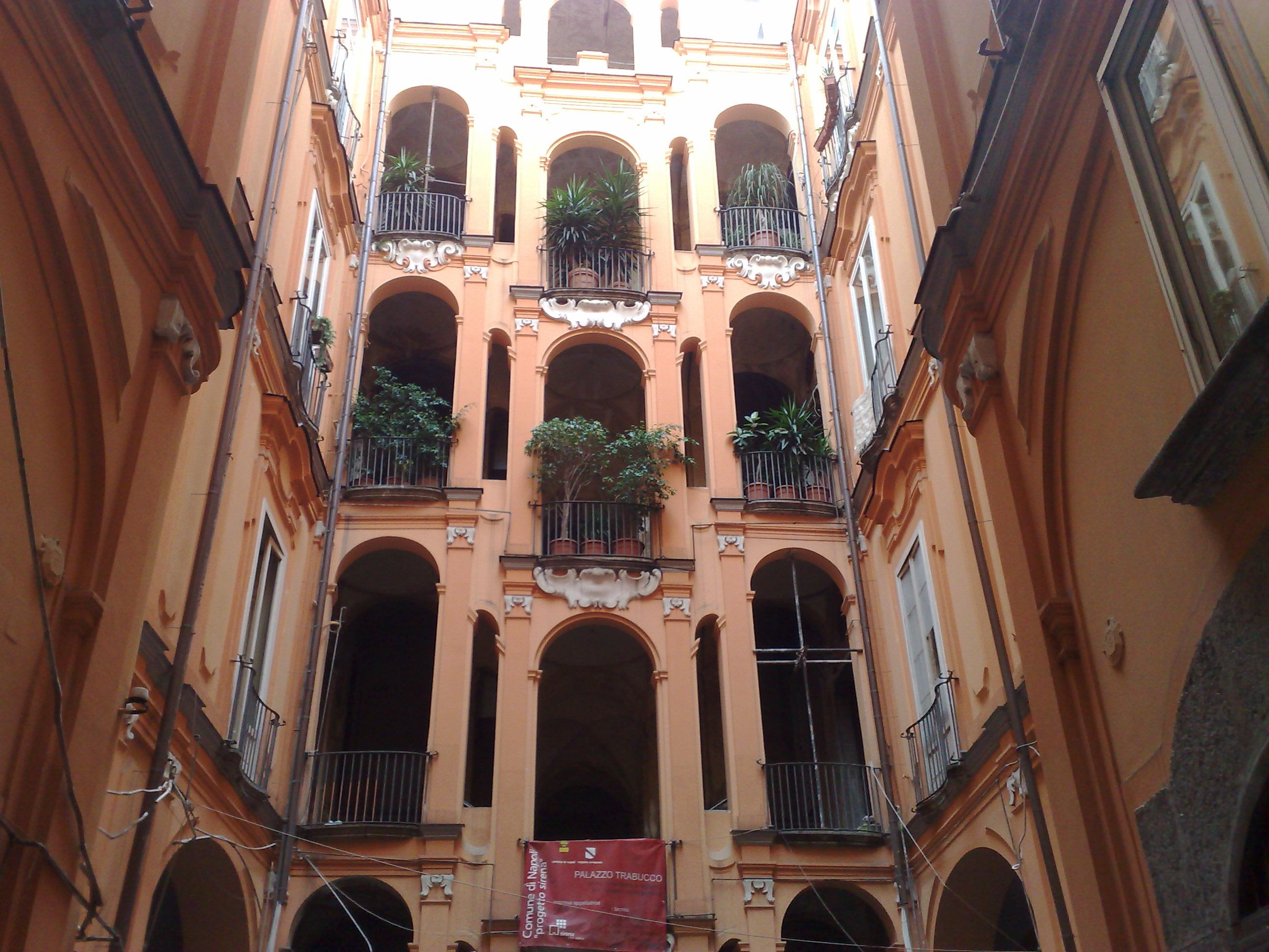 Palazzo Trabucco (Napoli) - Scalone monumentale sul cortile interno